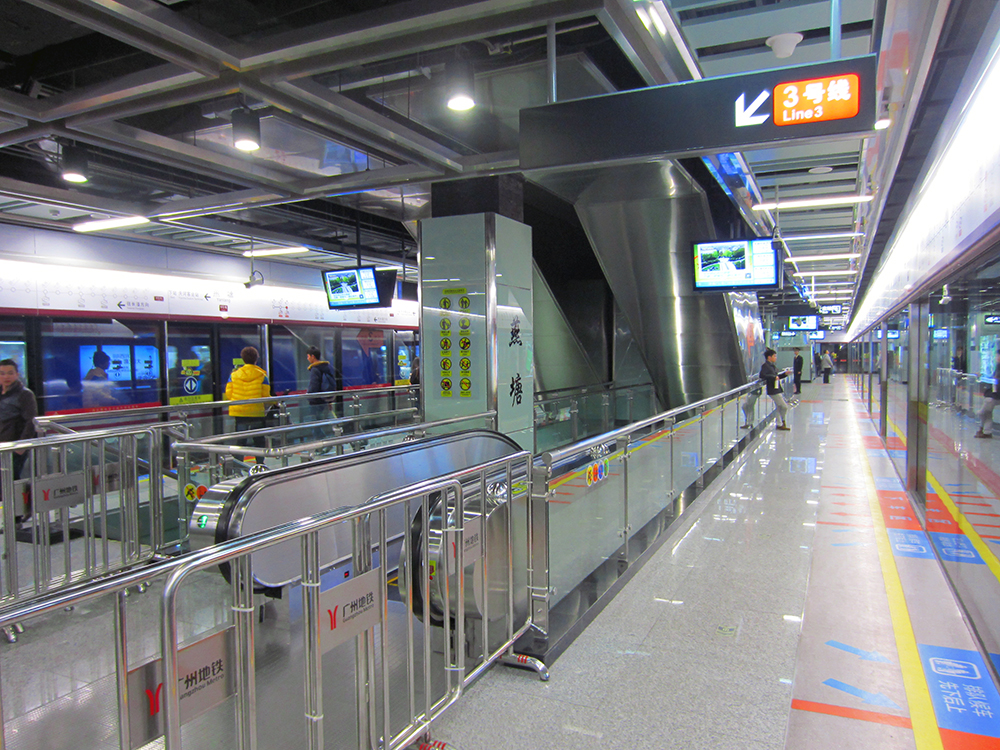 燕塘站6號線站台